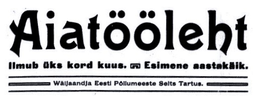 Aiatööleht 1907 päis